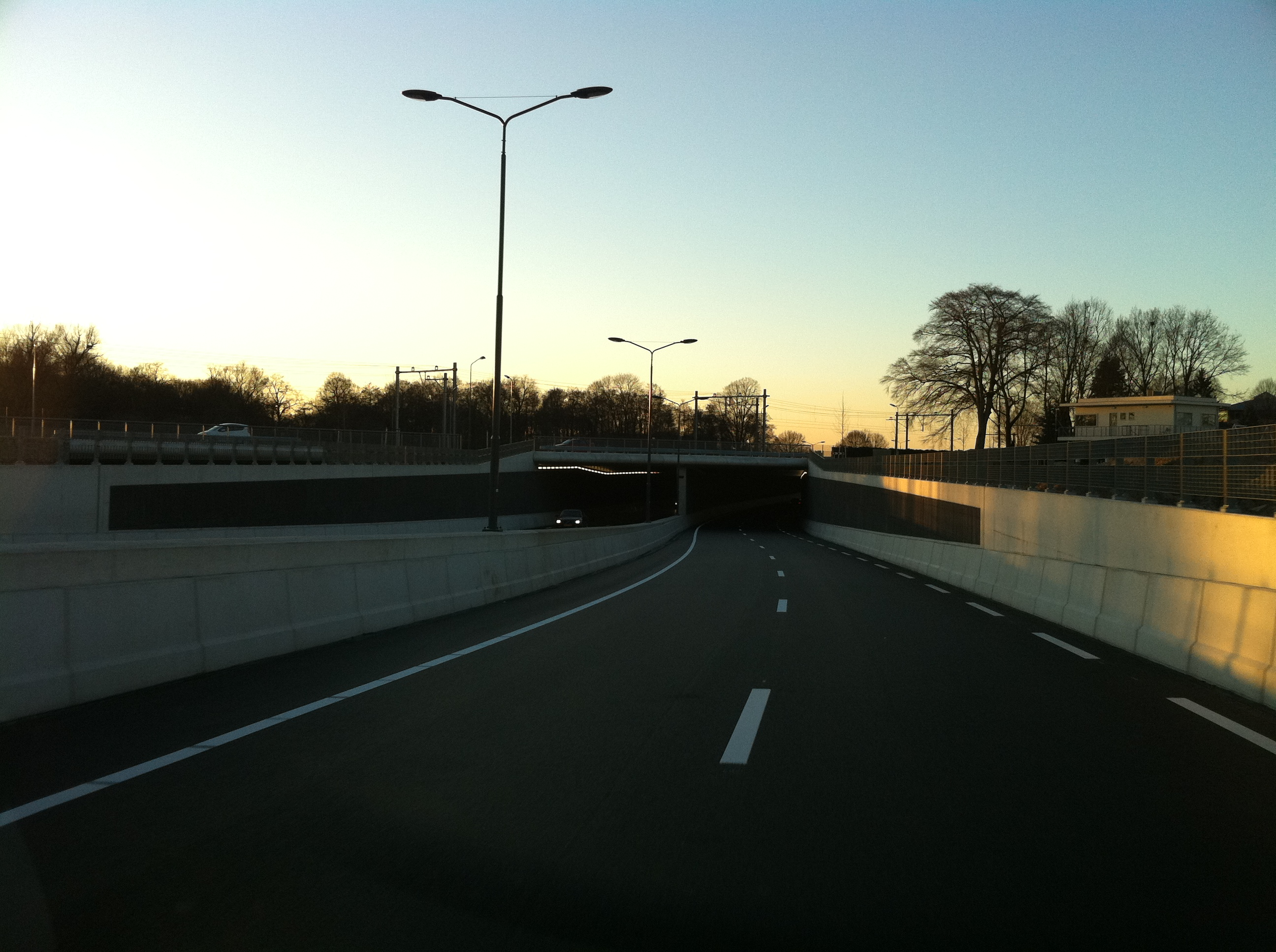 Spoorweg viaduct in randweg den Bosch met rechts de oude benzinepomp van Architect Meijlink.